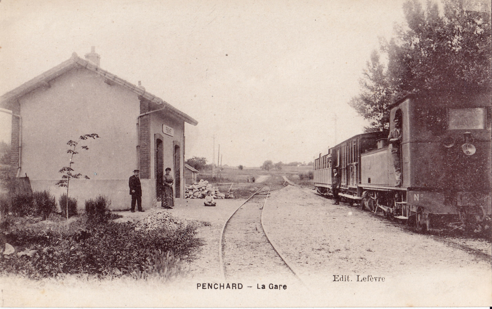 Carte postale ancienne éditée par Lefèvre : PENCHARD - La Gare